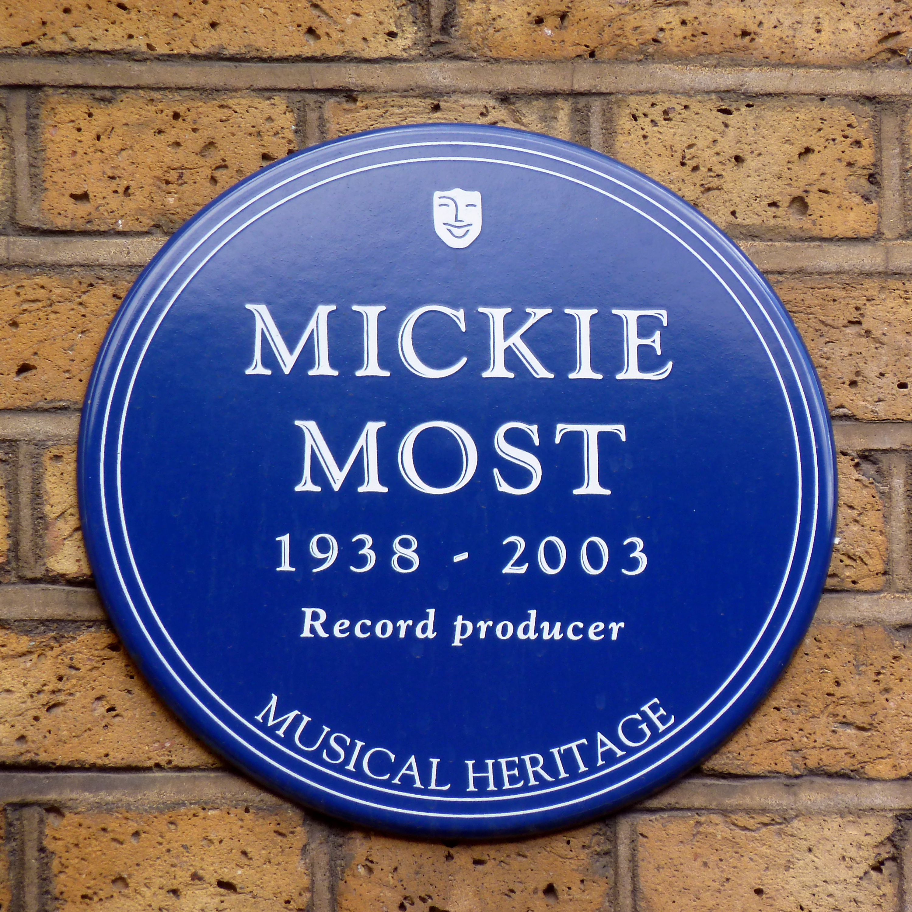 Mickie Most